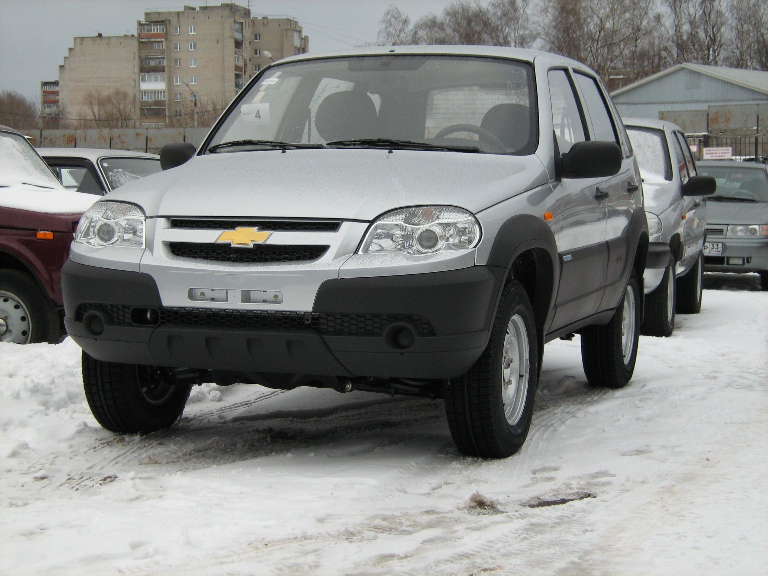 Рестайлинговая Шевроле Нива, вид спереди